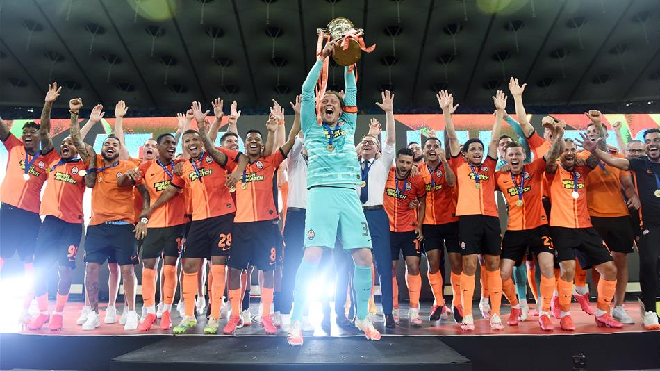 Шахтар (Донецьк) святкує чемпіонство 2020 року